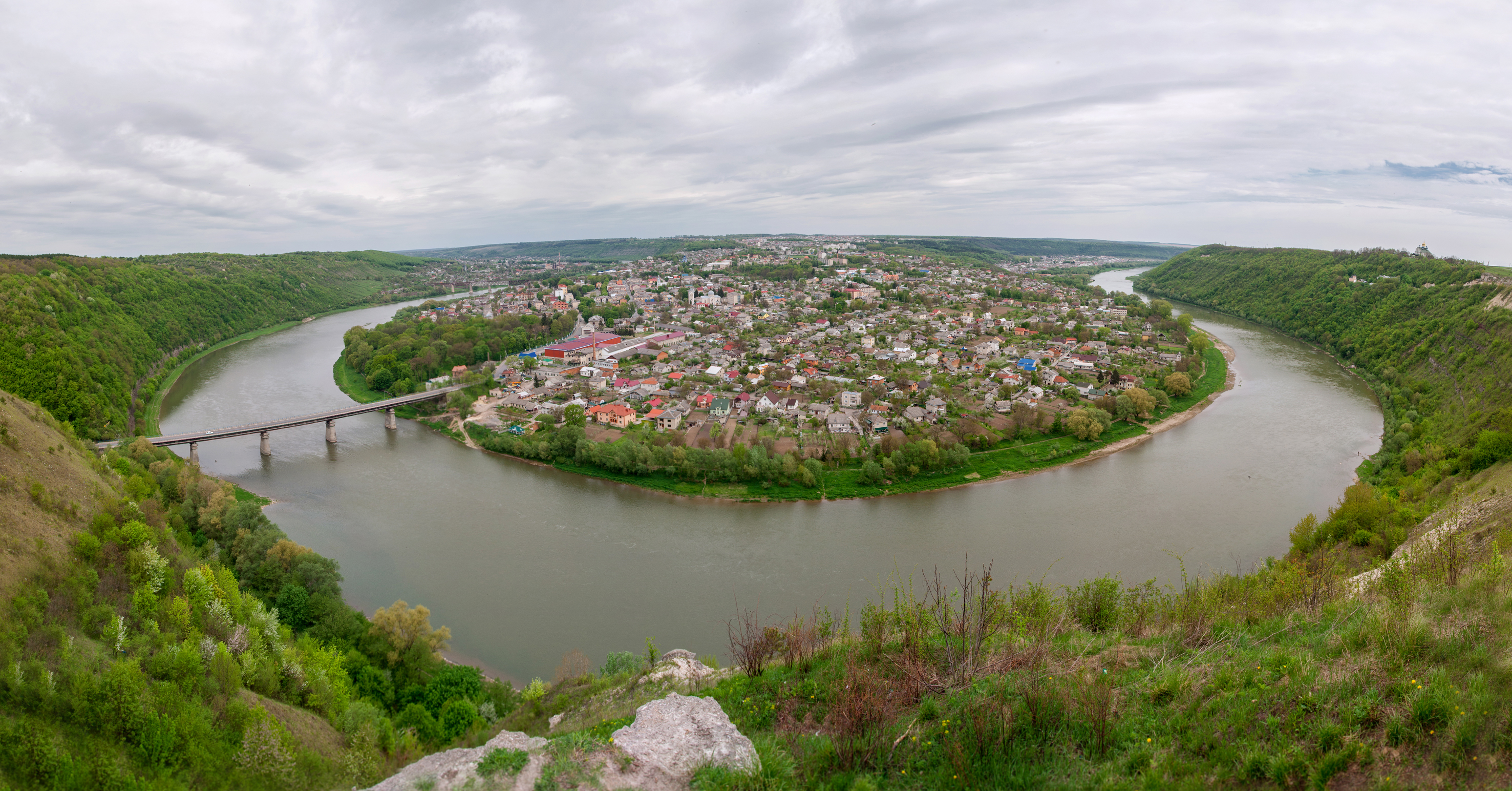 «Дністровський каньйон» біля Заліщиків.